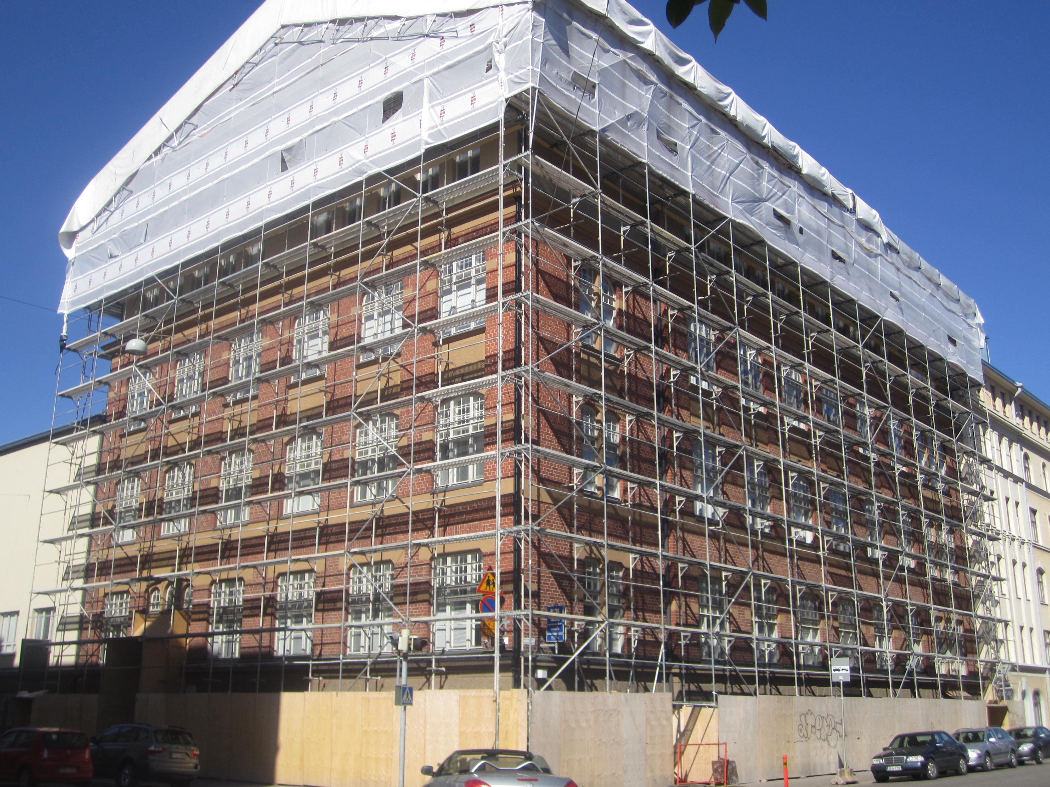 Töölön ala-asteen koulu remontissa elokuussa 2015.